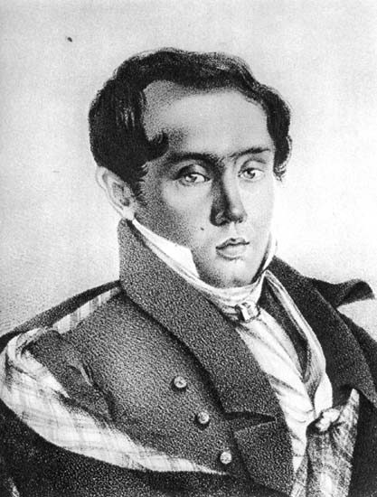 Баратынский Евгений Абрамович (Боратынский)